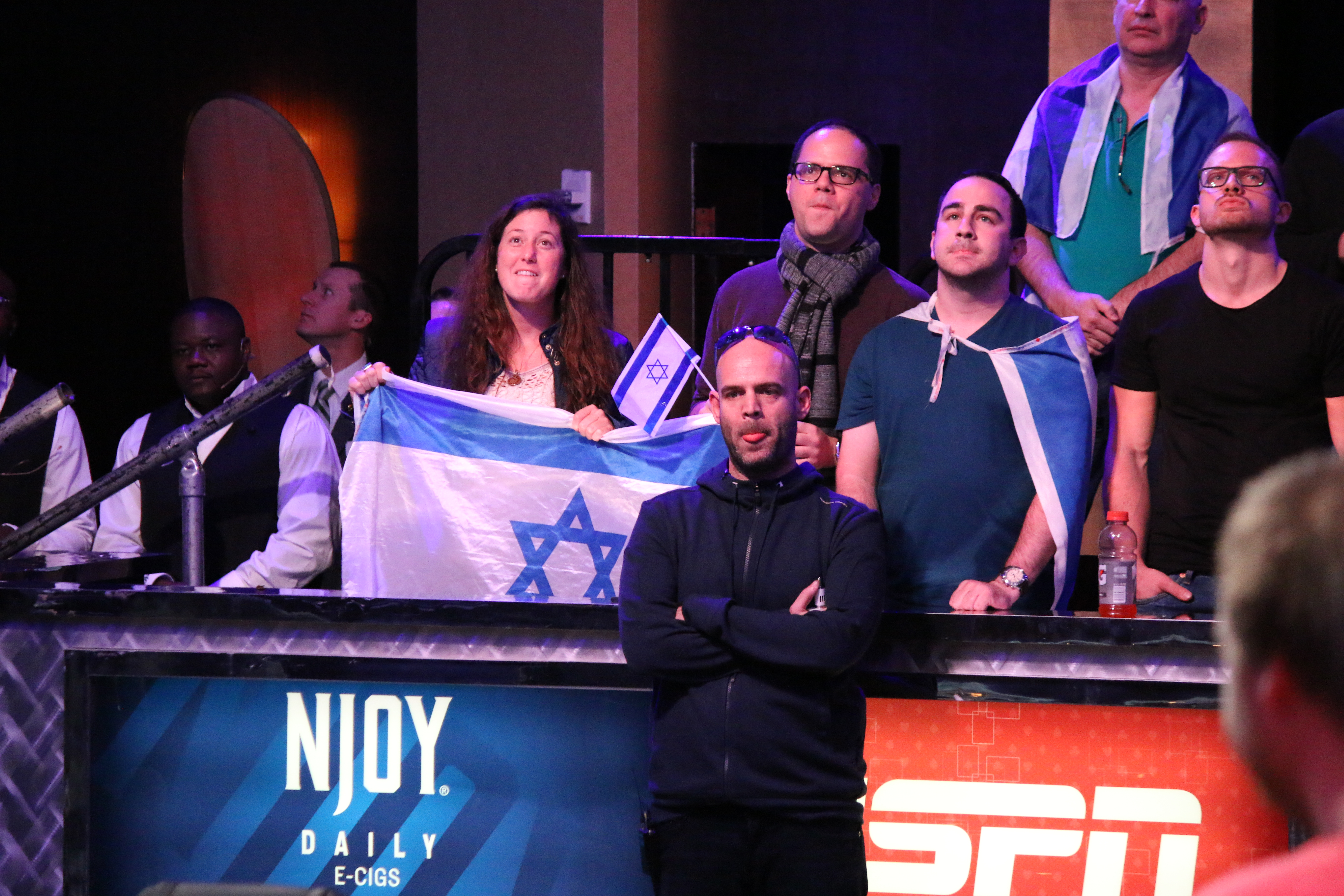 Zvi Stern am Finaltisch des Main Event der World Series of Poker 2015; rechts Martin Jacobson